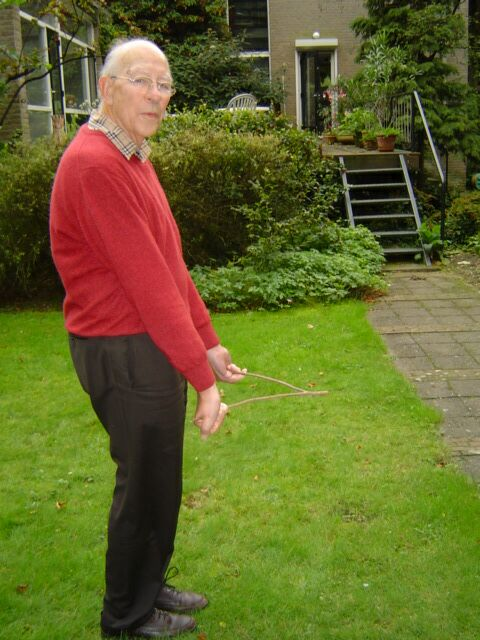 Wichelroedeloper